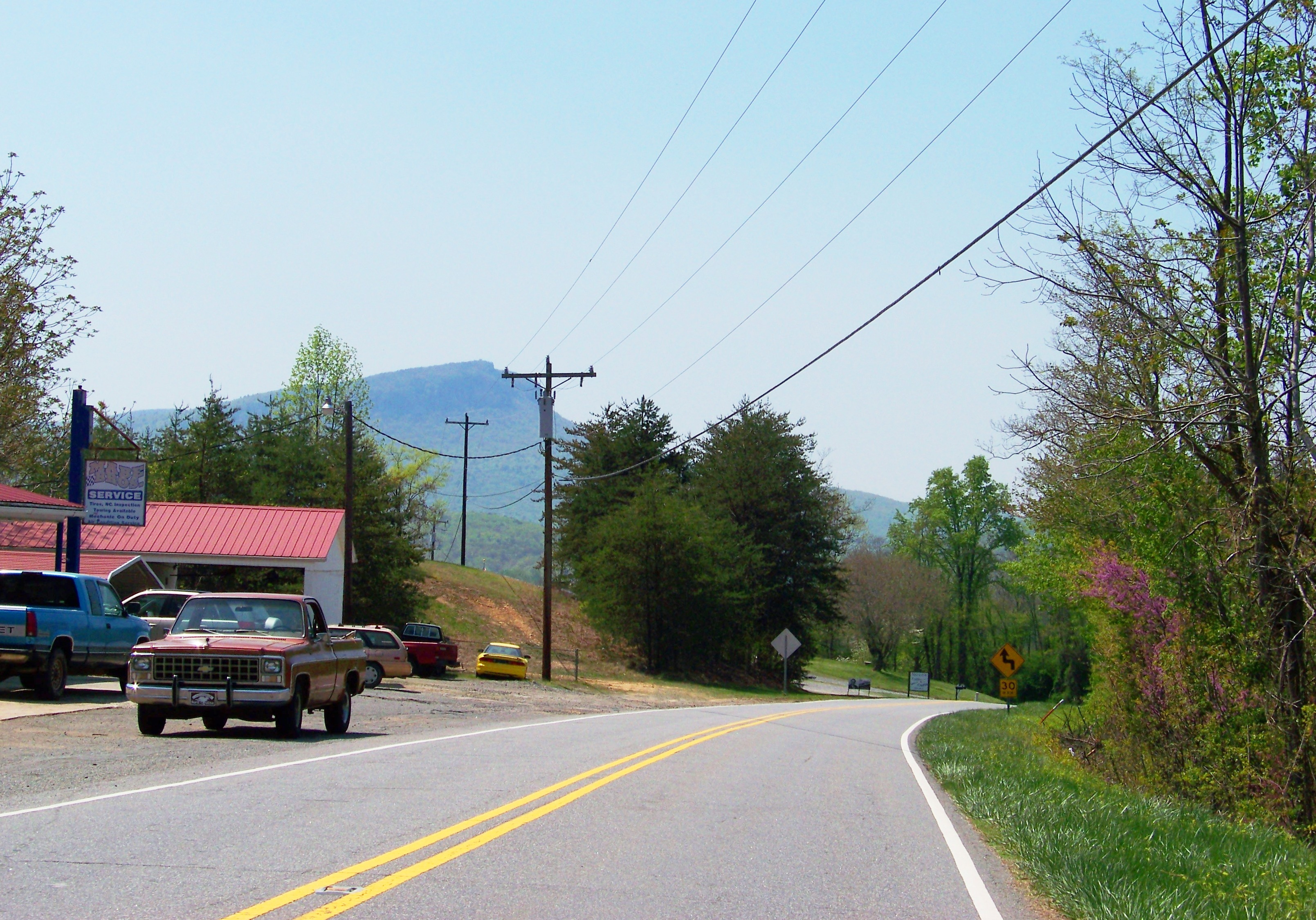 Peters Creek, NC, USA